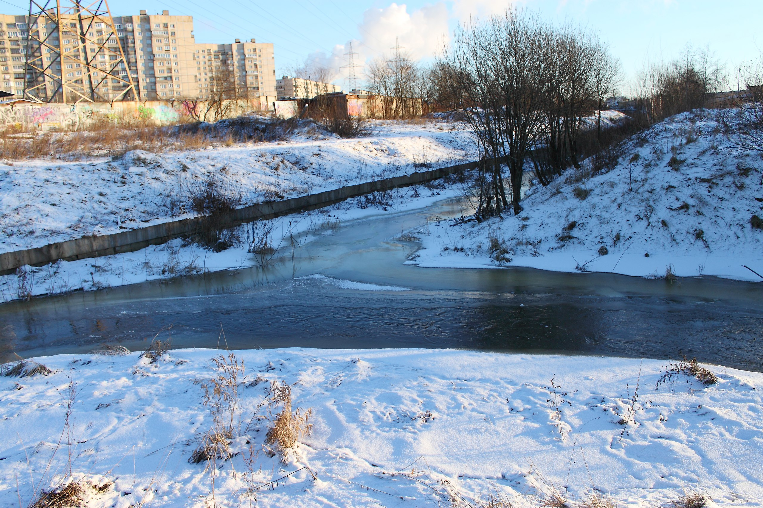 Район впадения Шушарского ручья в Волковку южнее Балканской площади в Купчино (Санкт-Петербург). Волковка течет справа налево. Шушарский ручей - дальнее русло.